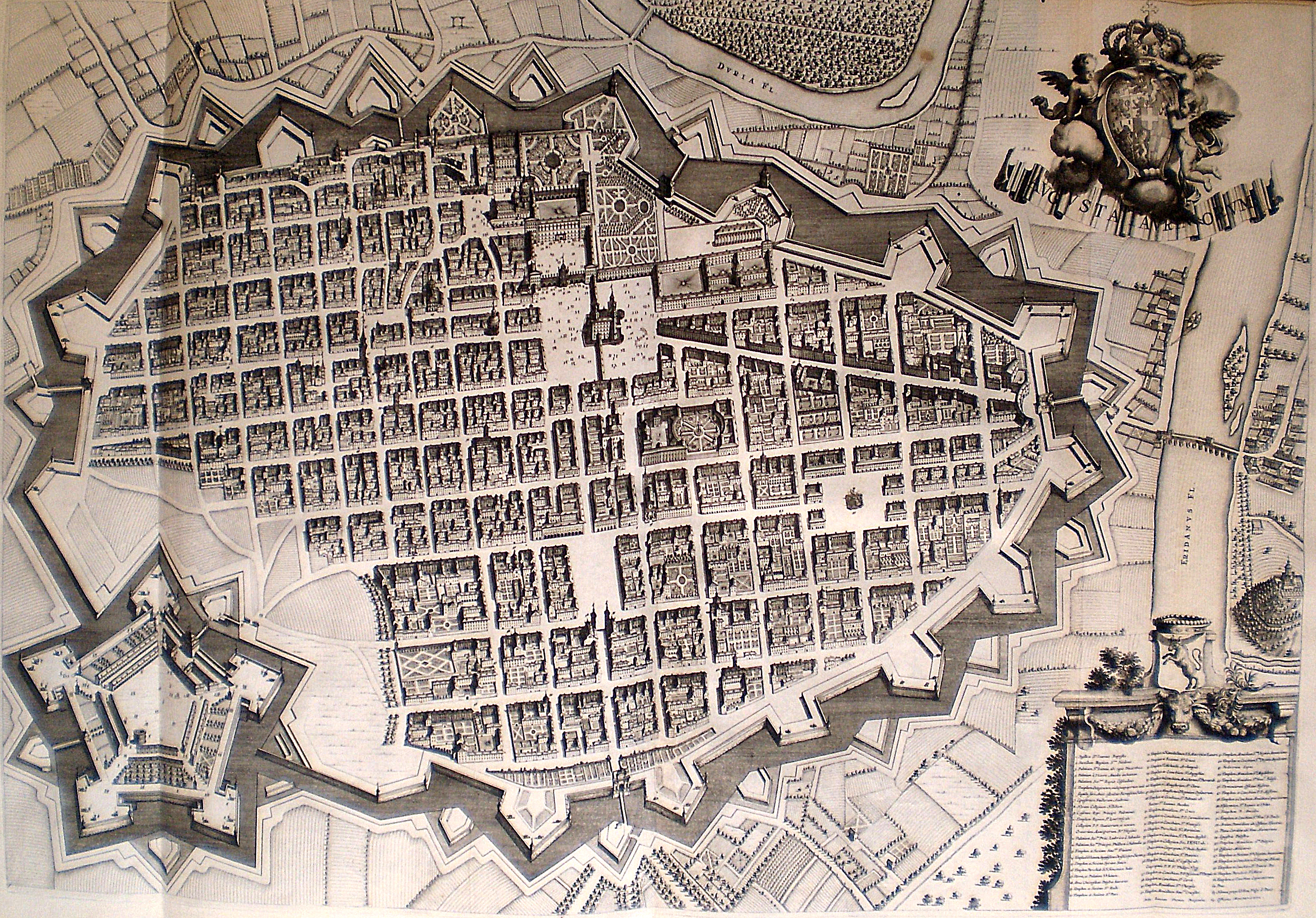 Torino, pianta. Incisione (mm 515x756), anonima su disegno del 1674 di Giovanni Tommaso Borgogno (Dal Theatrum Sabaudiae)